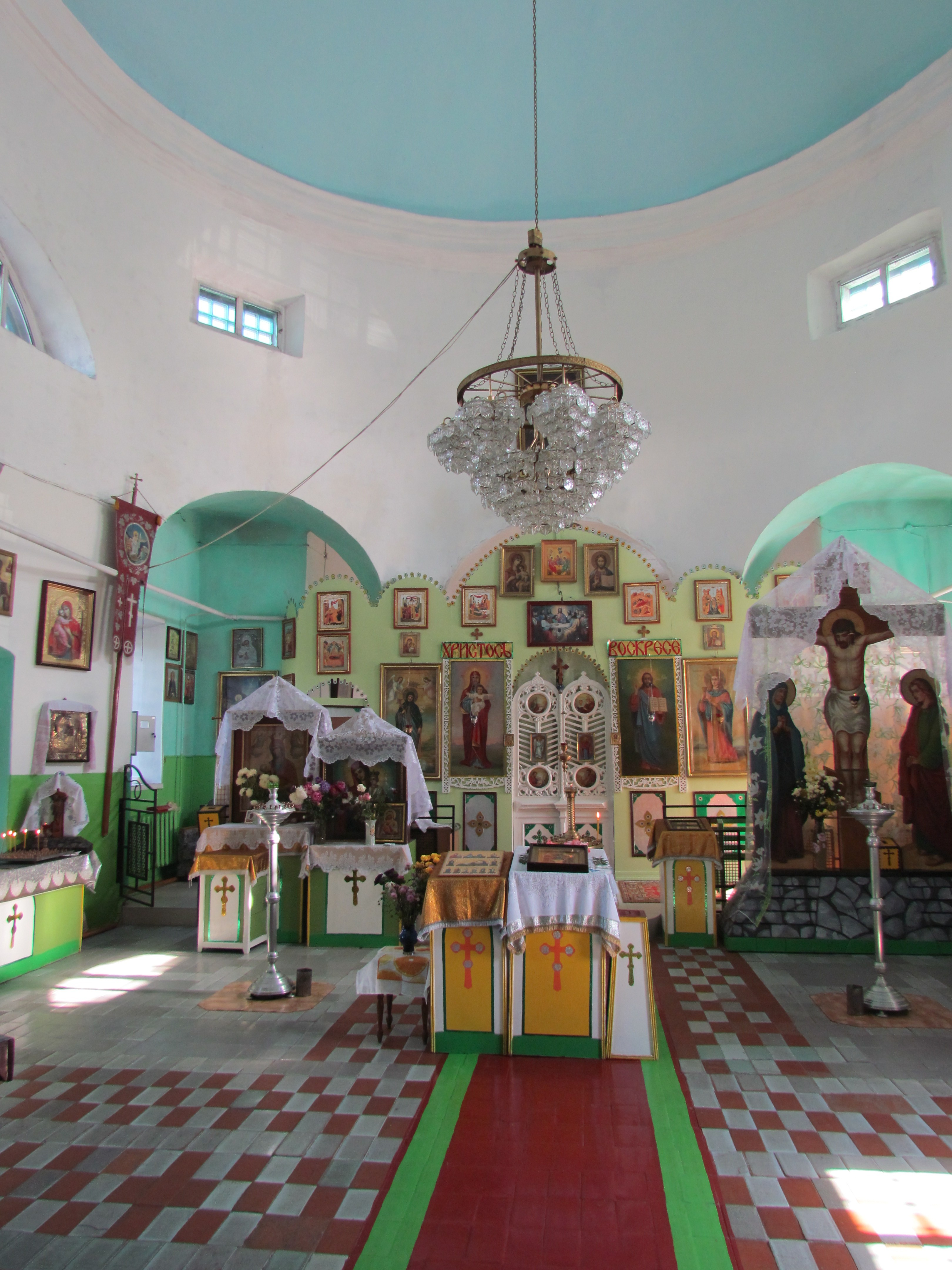 Беларуская (тарашкевіца): Дуброўна. Царква Сьвятой Тройцы